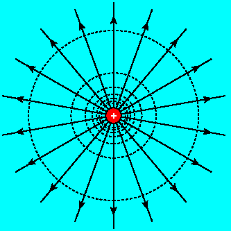 Superficies equipotenciales correspondientes a una caraga puntual